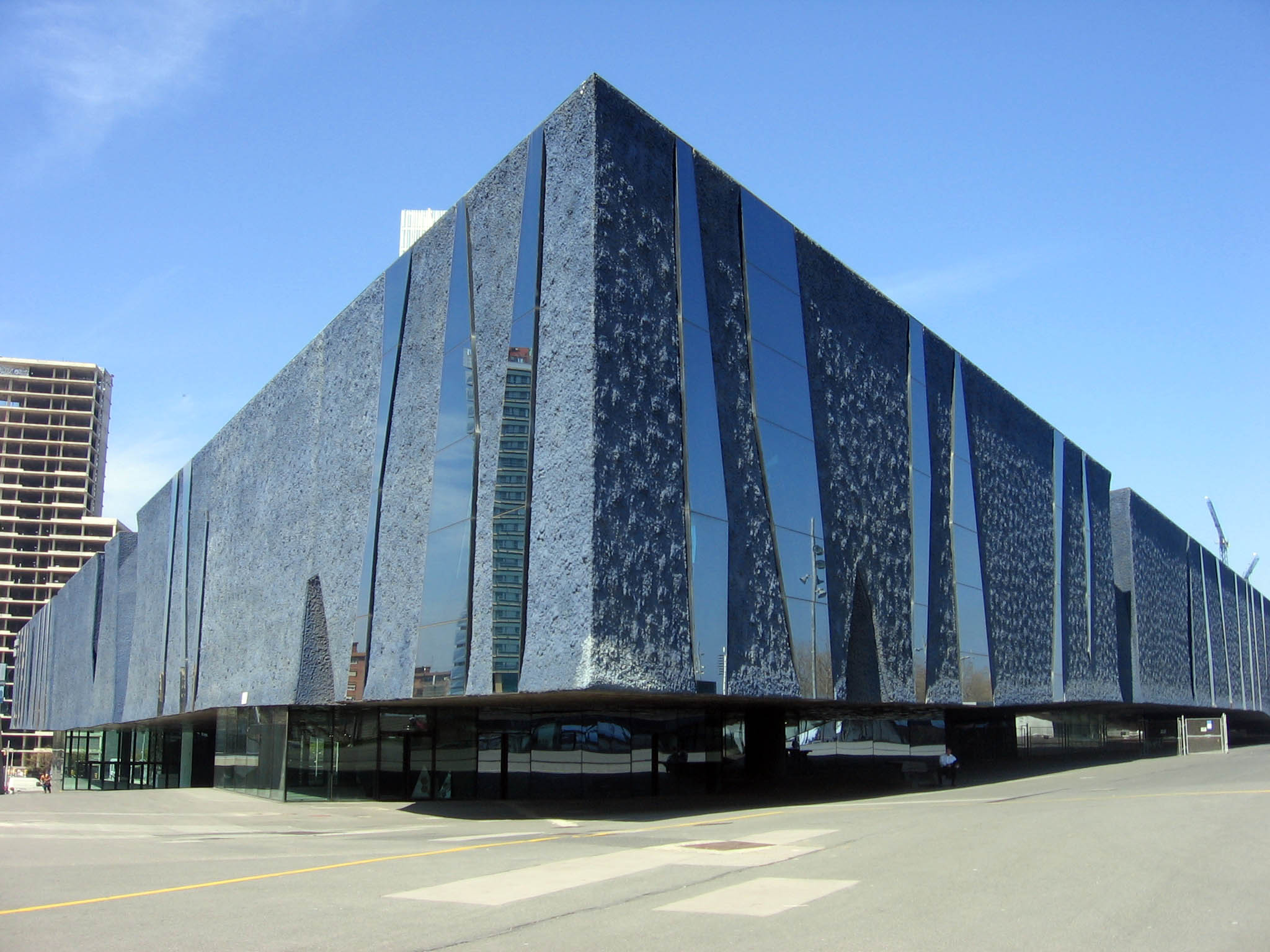 Edificio Fòrum.